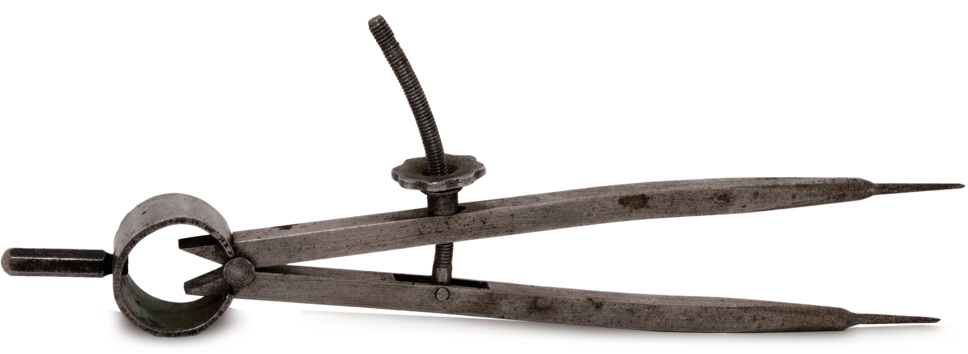 rýsovací kružítko